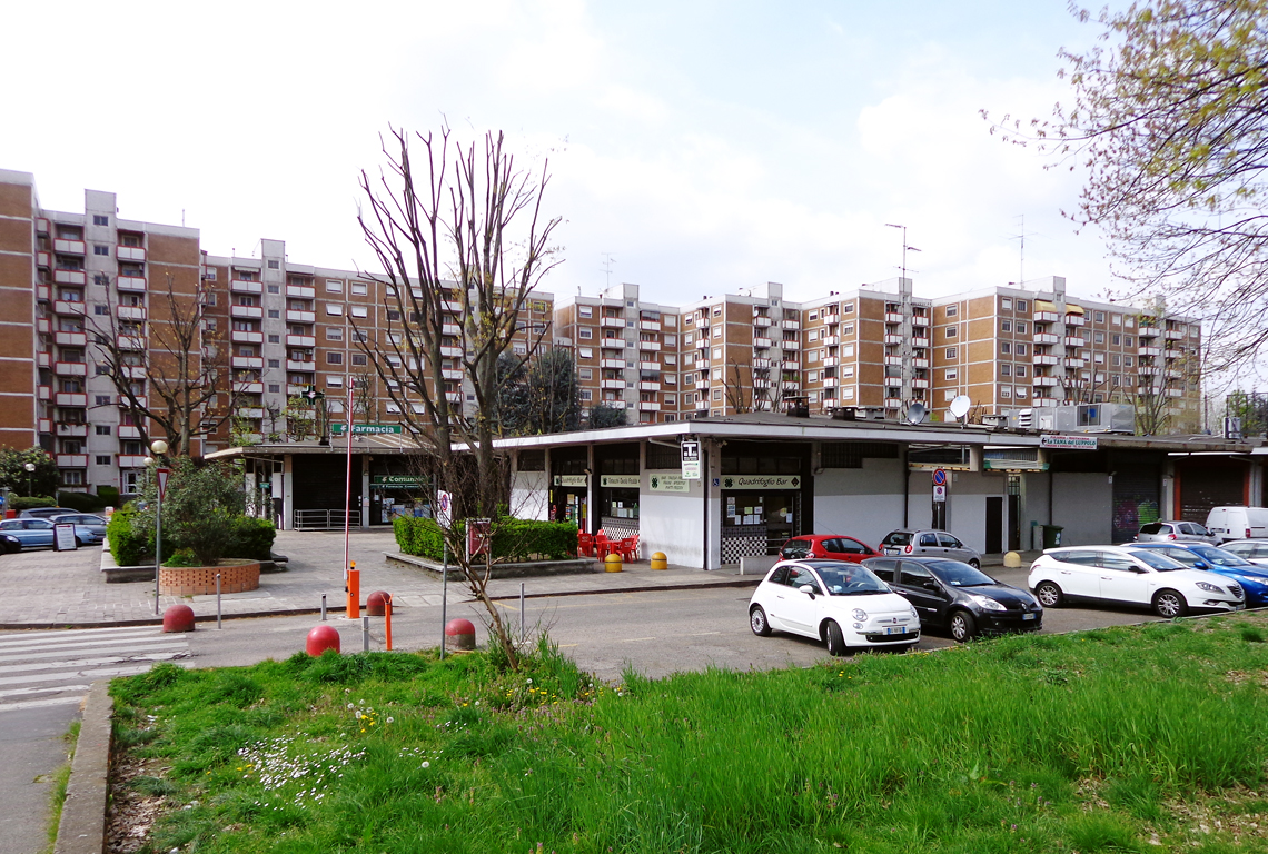 Milano, vista del quartiere Missaglia.